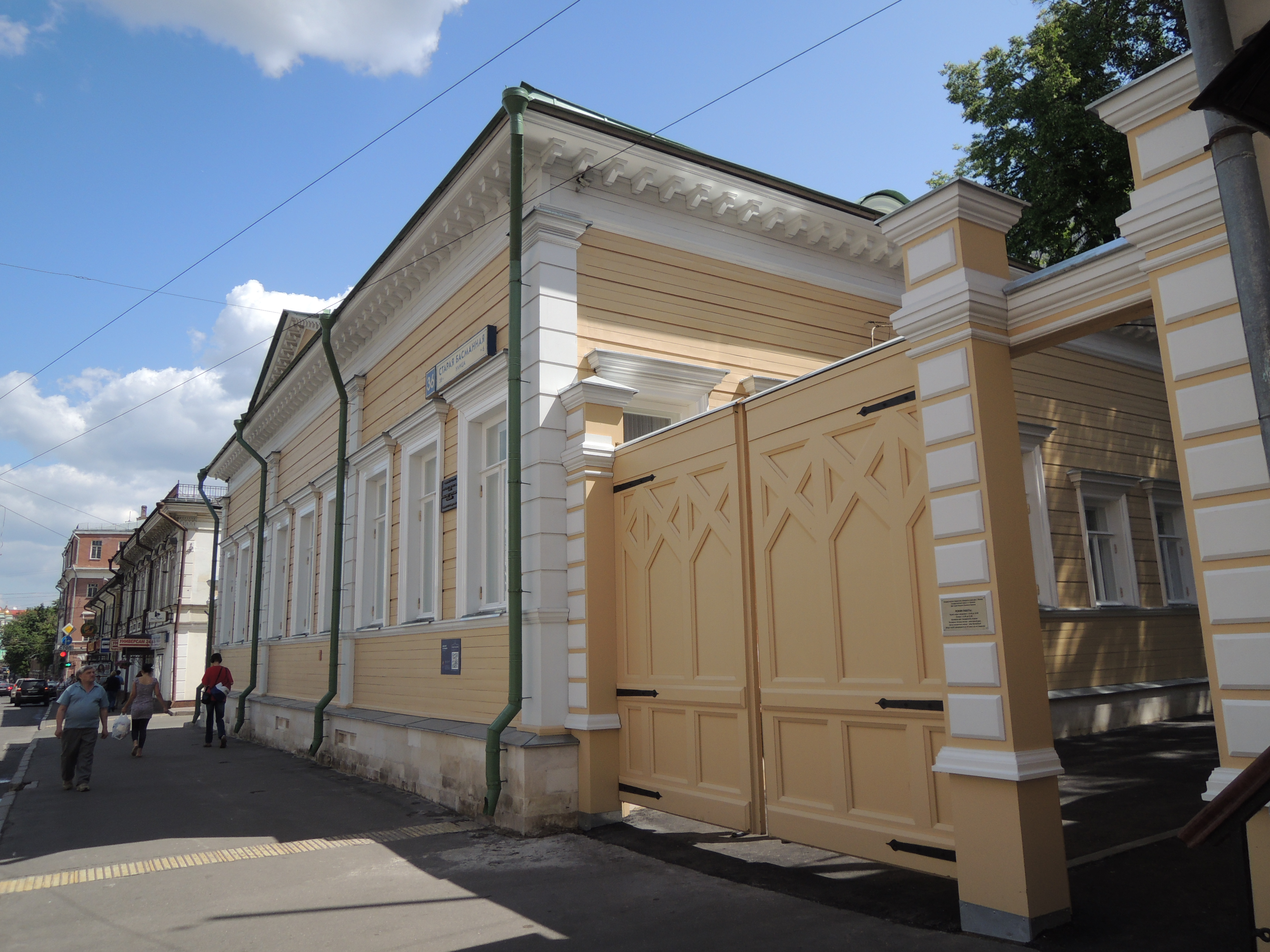 Дом-музей В. Л. Пушкина (филиал Государственного музея А. С. Пушкина) в день открытия 6 июня 2013 после масштабной реконструкции